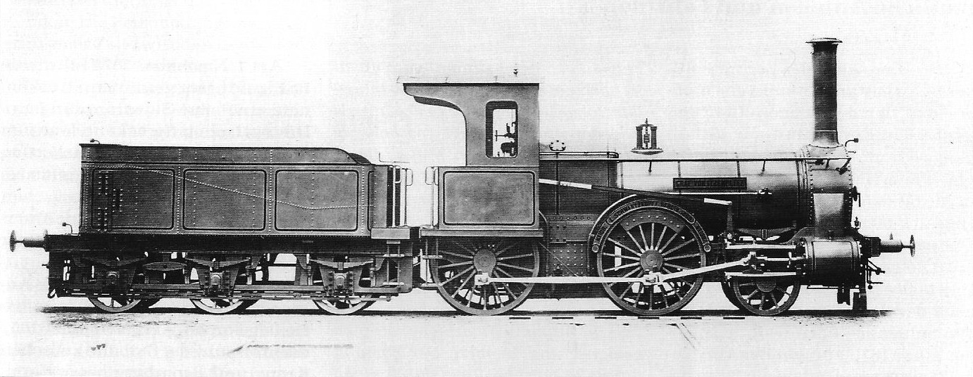 Lokomotive GRAF VON ITZENPLITZ der Berlin-Stettiner Eisenbahn-Gesellschaft.